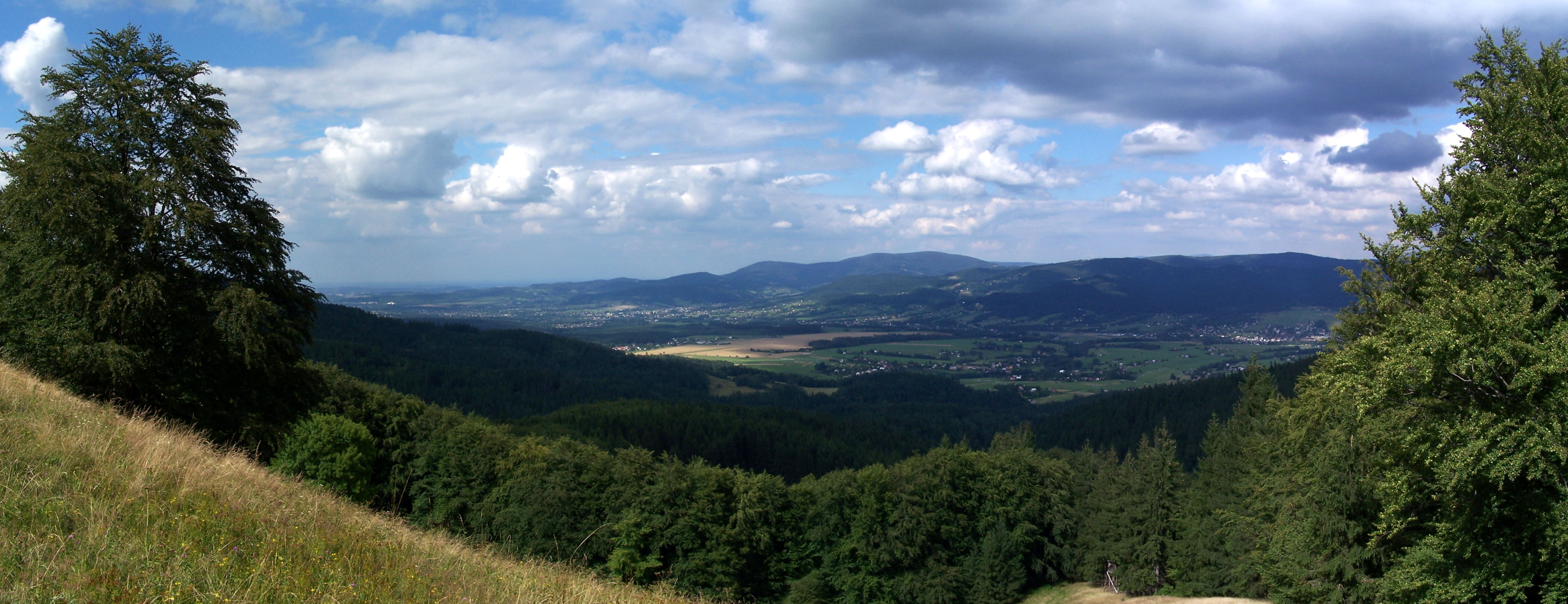 Panorama from Malá Kykula (Mała Kikula), Moravian-Silesian Beskids, Czech Republic